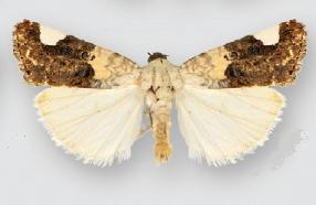 Acontia areletta male